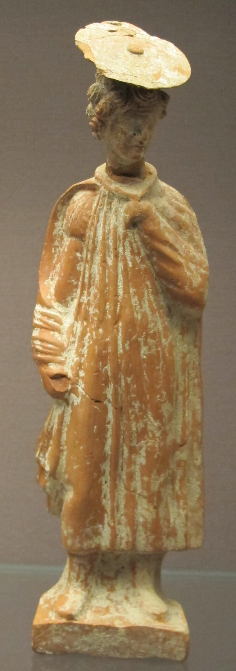 Beozia, giovane col petaso, 300 ac. ca